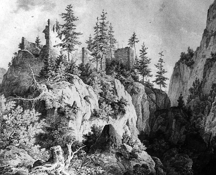 Ruine Vorderhohenschwangau um 1835. An ihrer Stelle steht heute Schloss Neuschwanstein